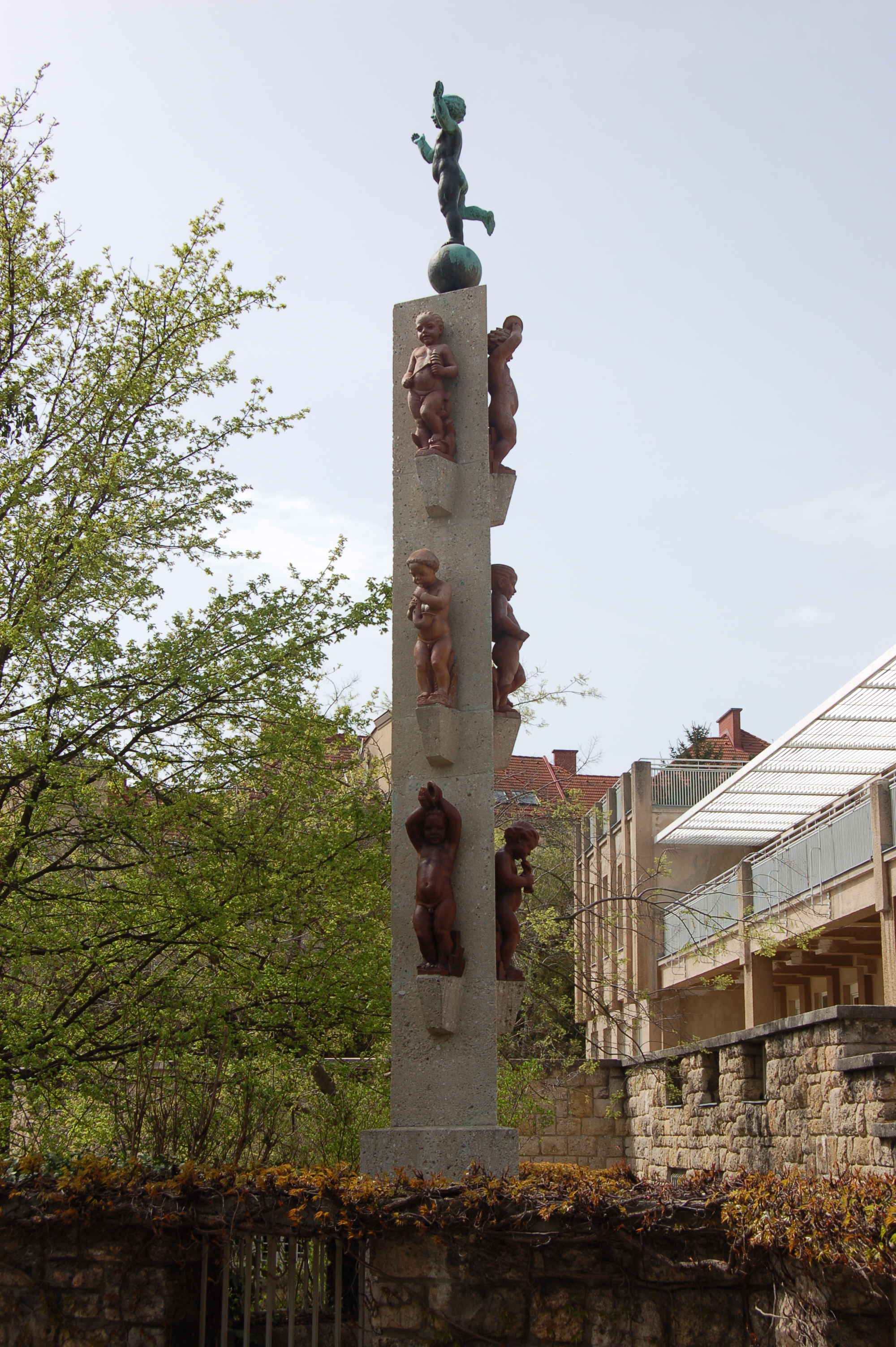 Die Säule des Frohsinns in der Wohnhausanlage Rosenackerstraße 5.